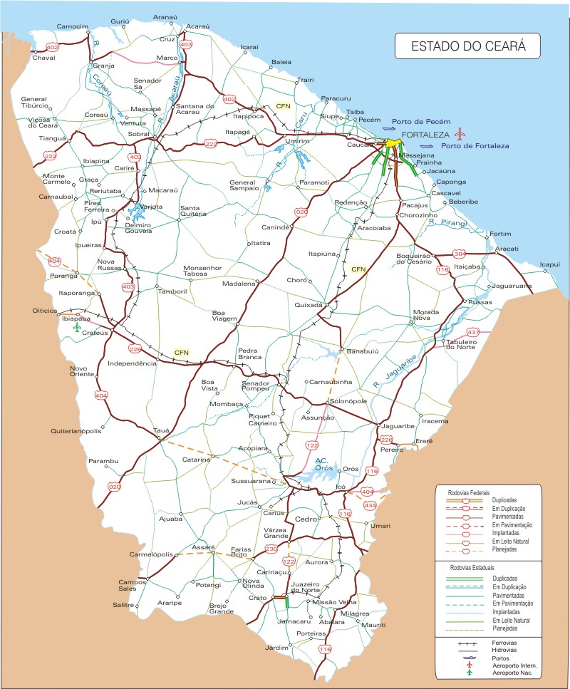 Mapa viário do Ceará